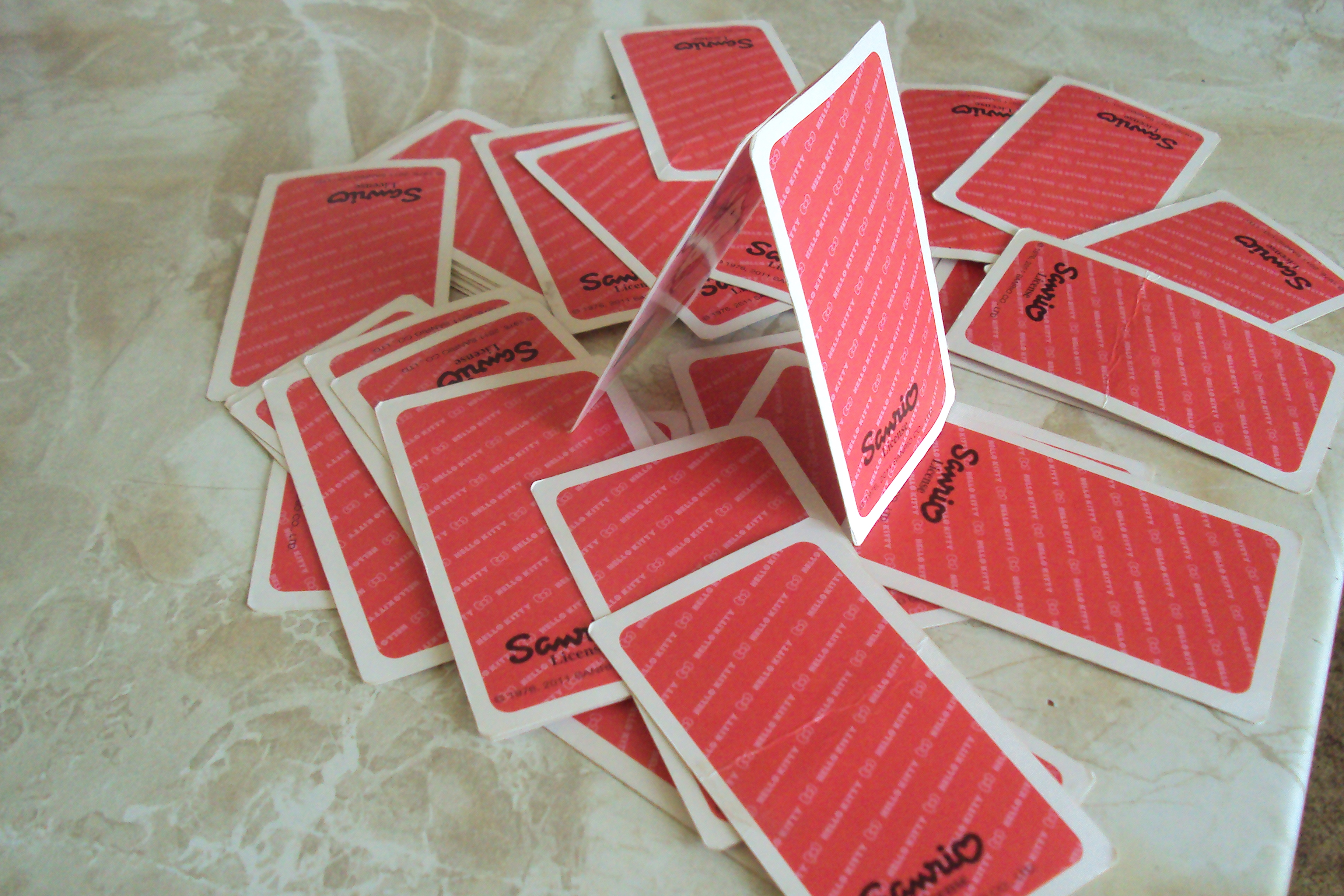 Dětská hra Záchod, počáteční stavba z libovolných karet